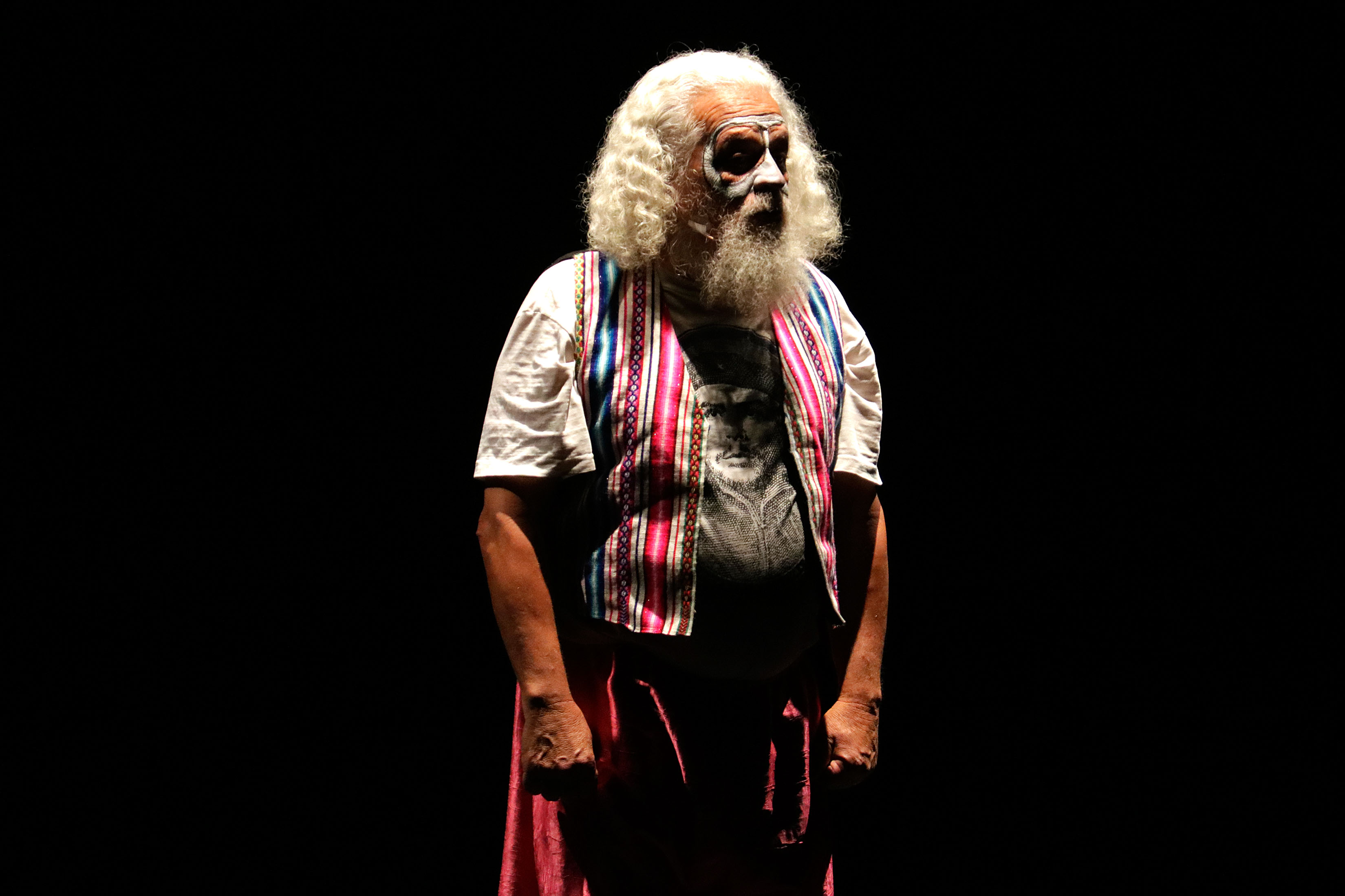 Jueves 26 de julio de 2018. En el marco de la 39 Muestra de Teatro de la Ciudad de México, se presentó en las instalaciones del Teatro de la Ciudad Esperazna Iris la obra de teatro El 68 ayer y hoy, a cargo y en reconocimiento a Enrique Cisneros El Llanero Solitito por su trayectoria en el teatro comunitario en CLETA, como parte del programa, se presentaron teatro-conferencias como Las consignas del Mayo Francés, El cuento del cuaderno, entre otros; además de la develación deuna placa en reconocimiento a su trayectoria, que otorgó la Secretaría de Cultura de la CDMX en el contexo de la muestra. Fotografía: Ana Cervantes/ Secretaría de Cultura CDMX